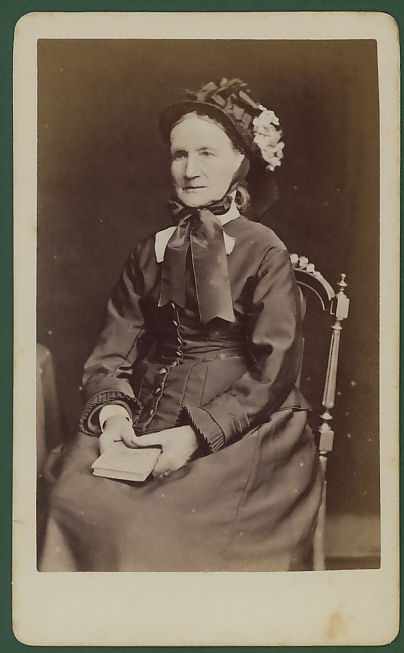 Fotografie einer sitzenden alten Dame mit Hut, großer Schleife und Buch in den Händen